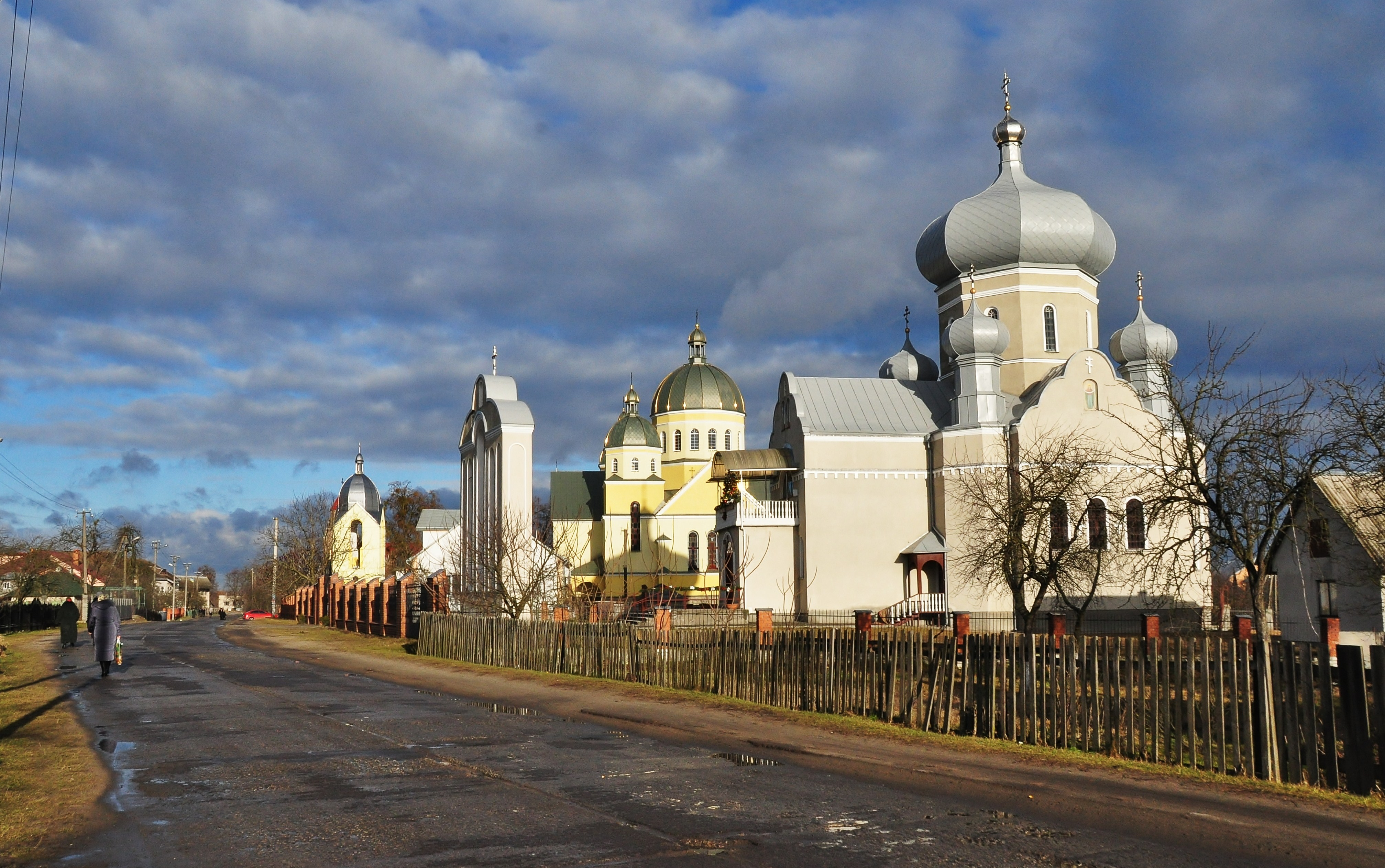 Вулиця у Старому Добротворі, Кам'янка-Бузький район Львівської області. Поруч розміщені Православна (КП), Греко-католицька та Римо-католицька церкви